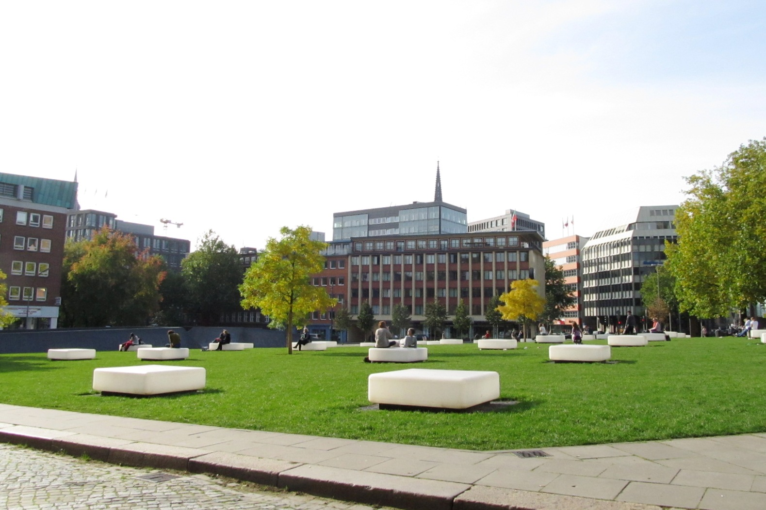 Domplatz, Hamburg-Altstadt, DE